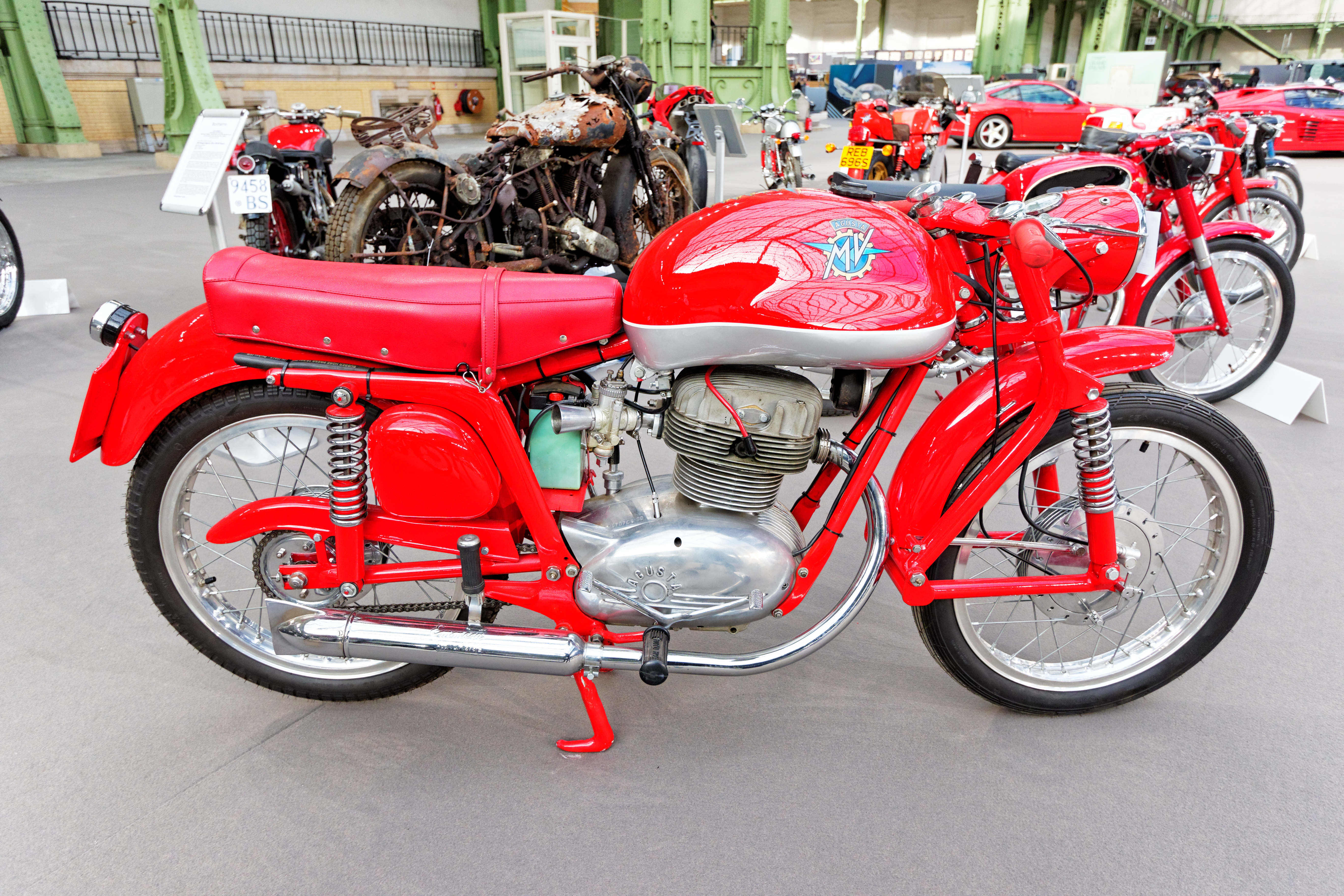 Un des véhicules présenté lors de la vente aux enchères Bonhams 2016 au Grand Palais de Paris.